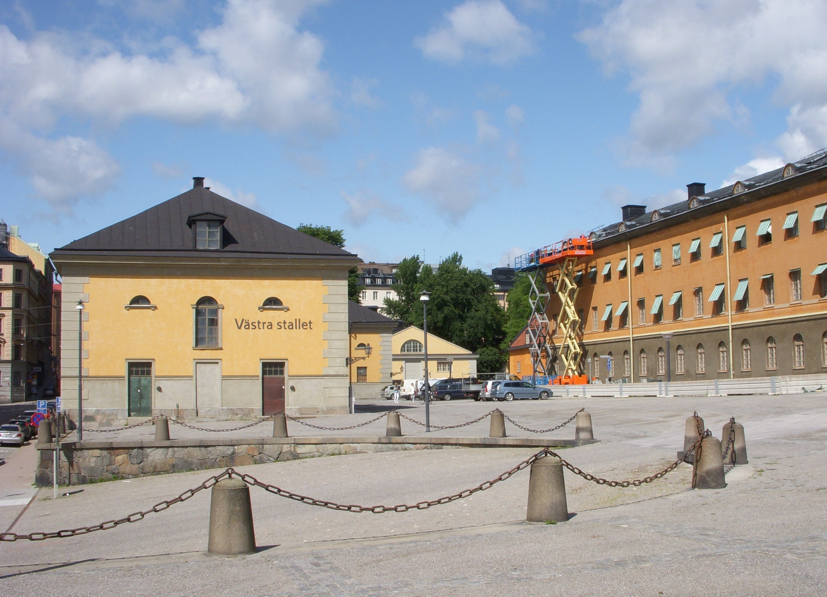 Kvarteret Krubban, Östermalm, Stockholm, "Västra stallet" och "Kanslikasernen", i bakgrunden syns "Ridhuset". Del av gamla Livgardet till häst (K 1).